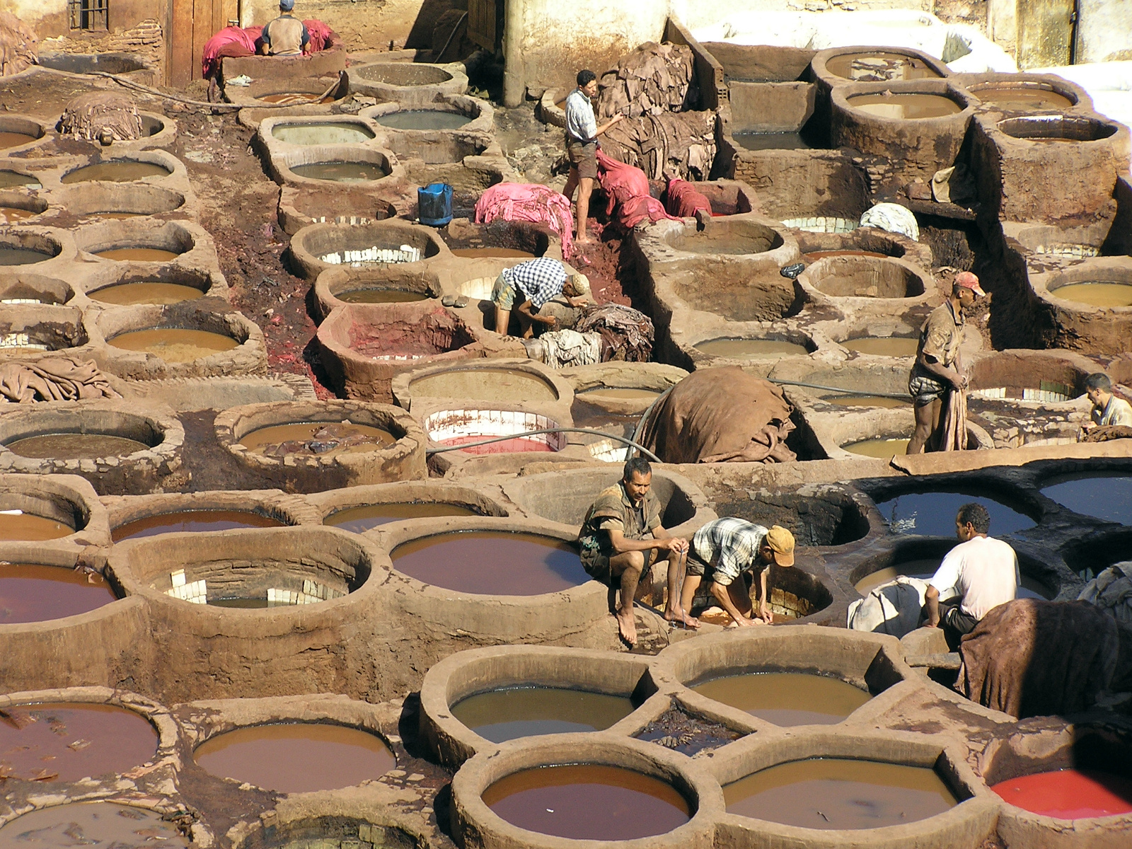 Arbeiter in Gerberei und Färberei (Fes, Marokko)